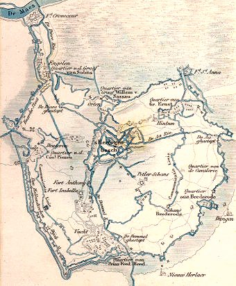 Kaart Den Bosch, 1629 (Circumvallatielinie)